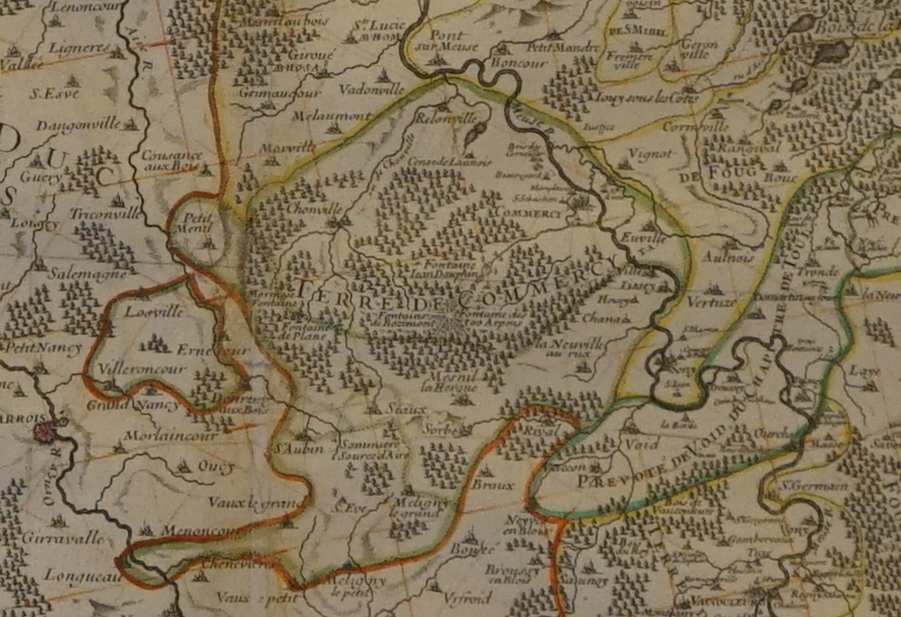 au musée de TOul. .